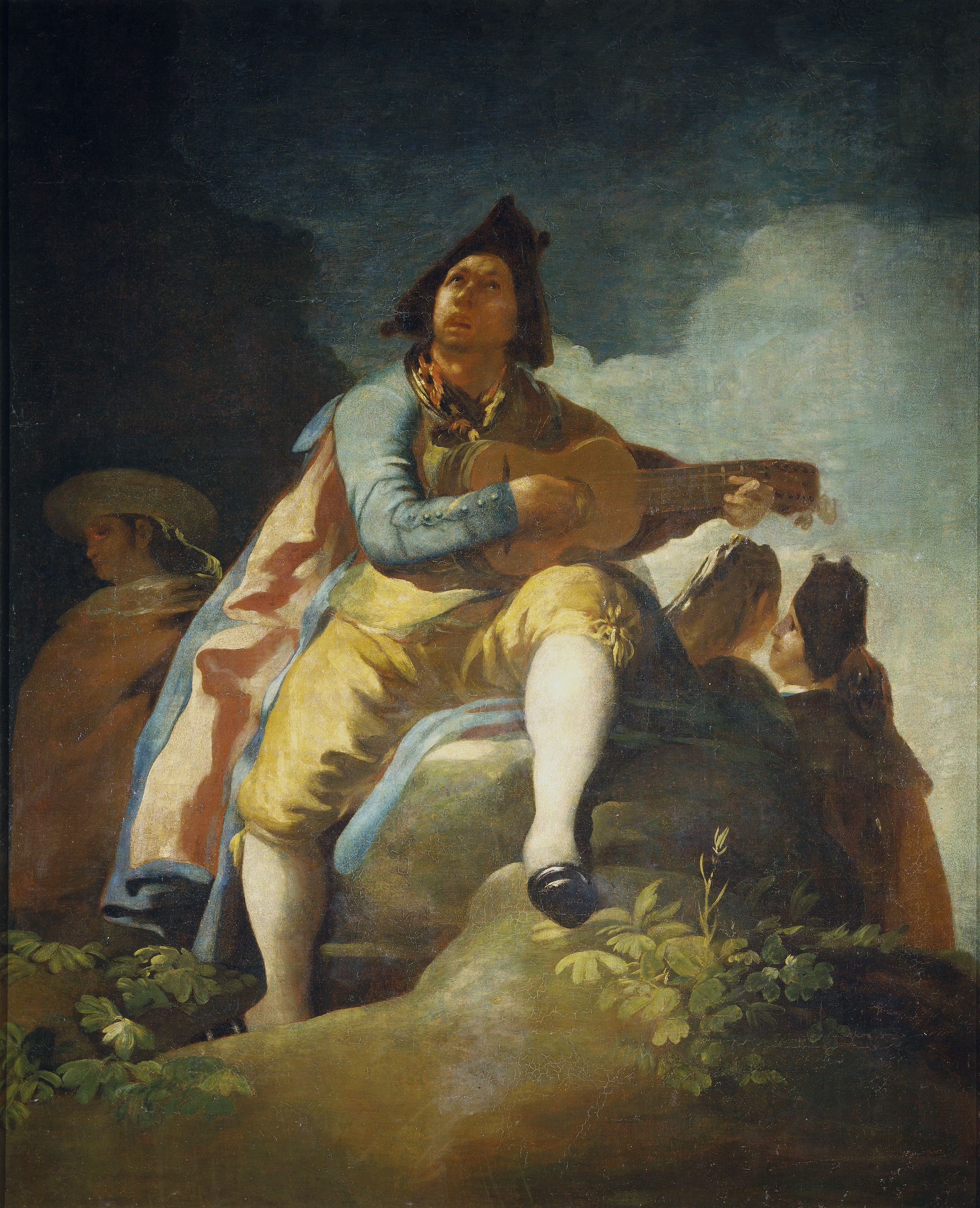 Cartones para tapices.